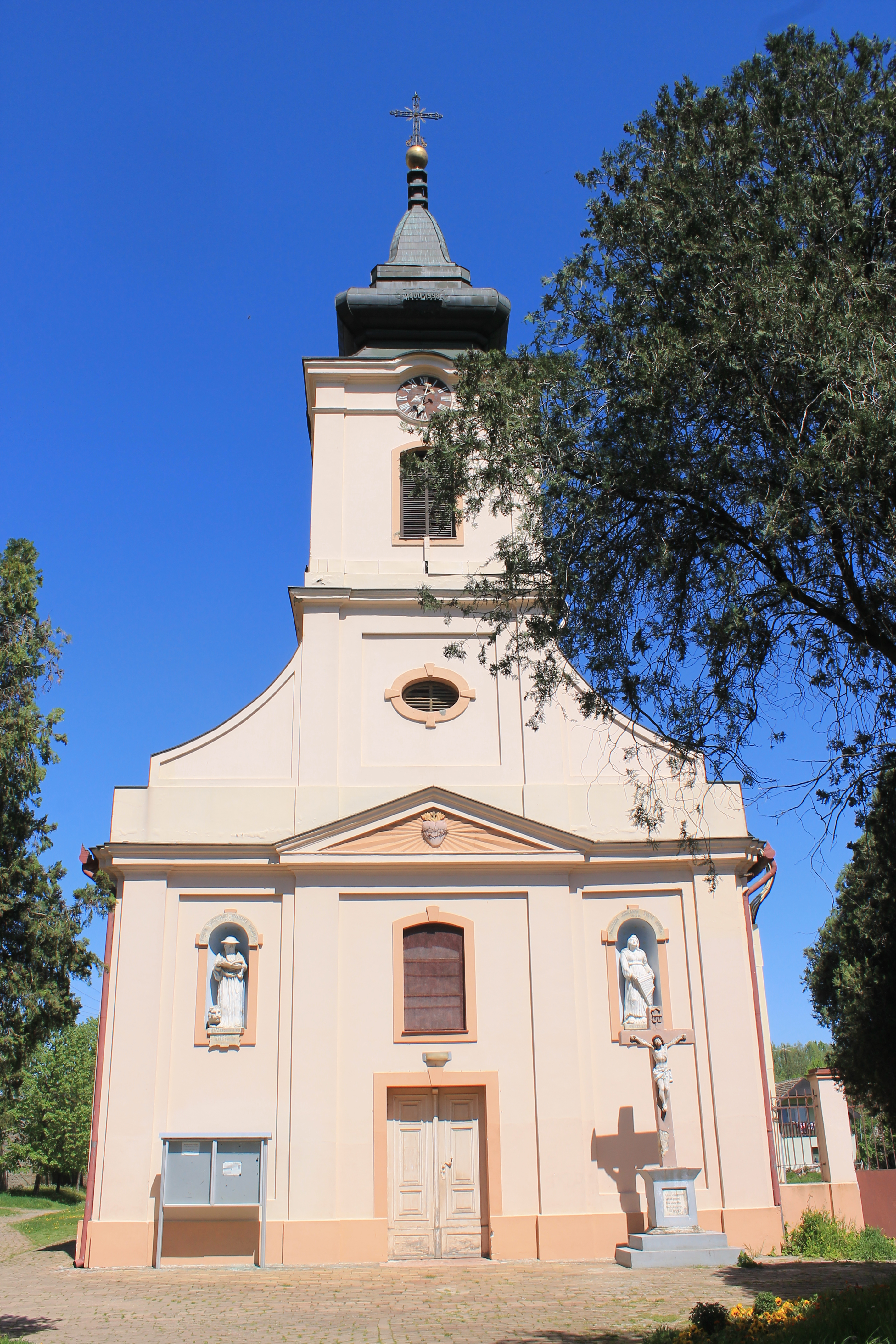 Crkva Uzvišenja Svetog križa, Petrovaradin